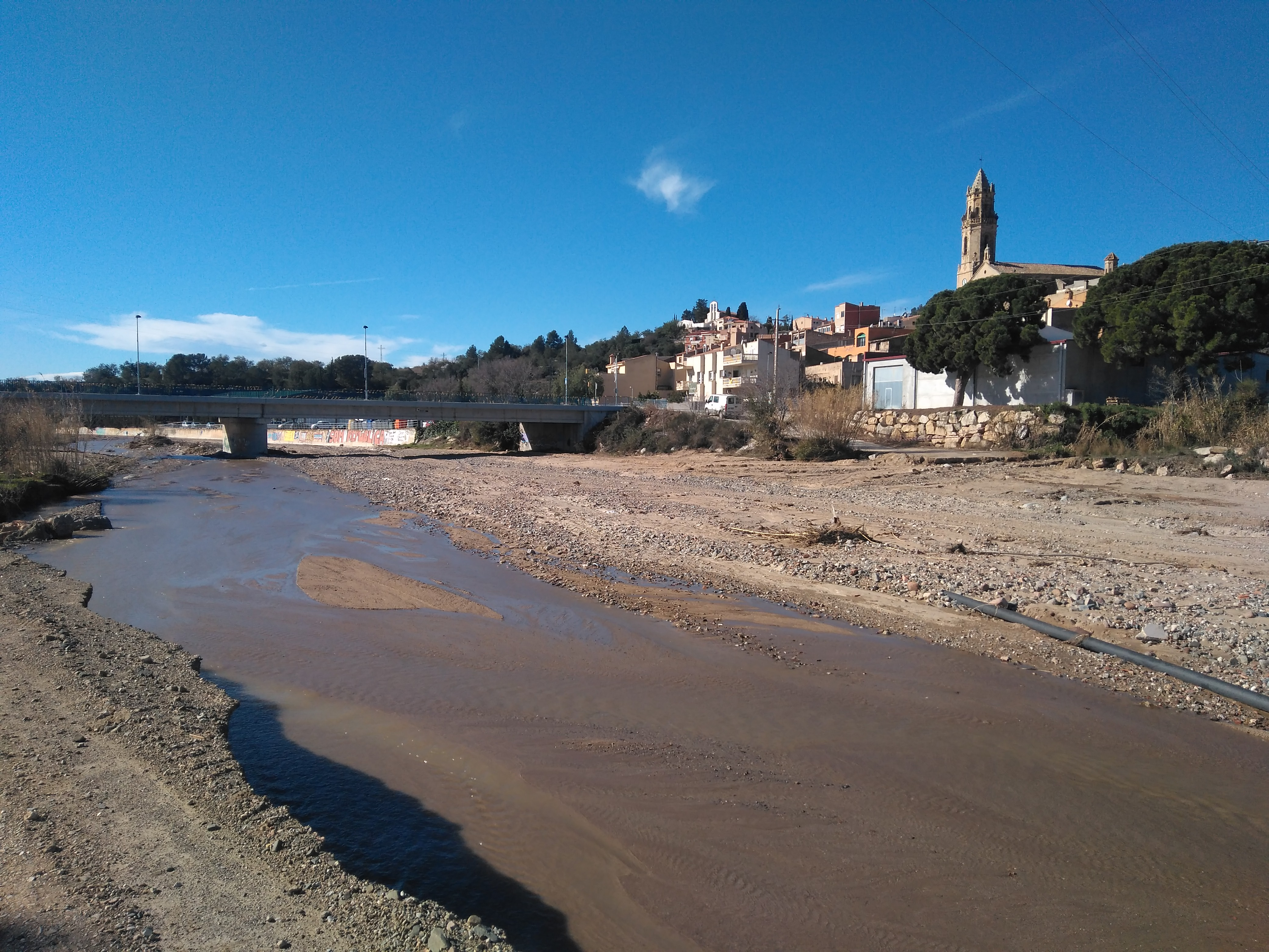 Riera de Maspujols al seu pas per Maspujols